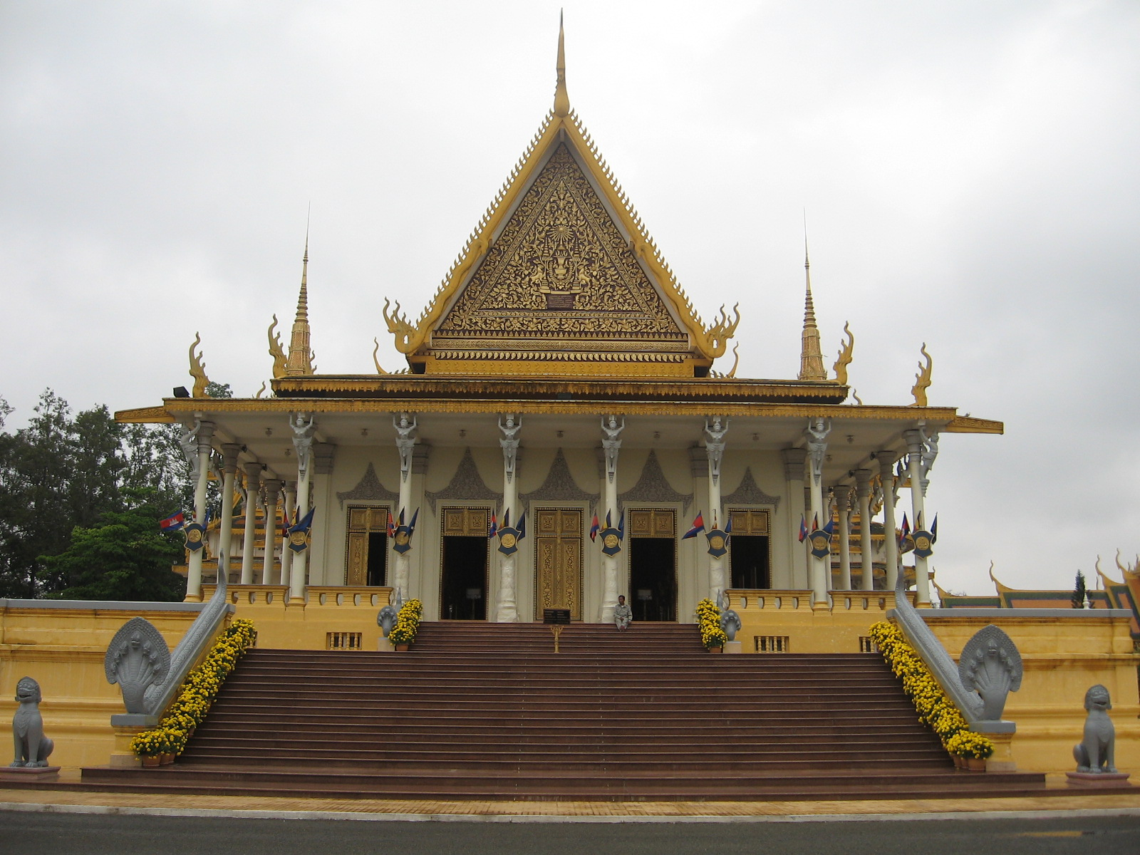 Phòng Khánh tiết - ảnh do Phan Minh Châu chụp tại Hoàng Cung